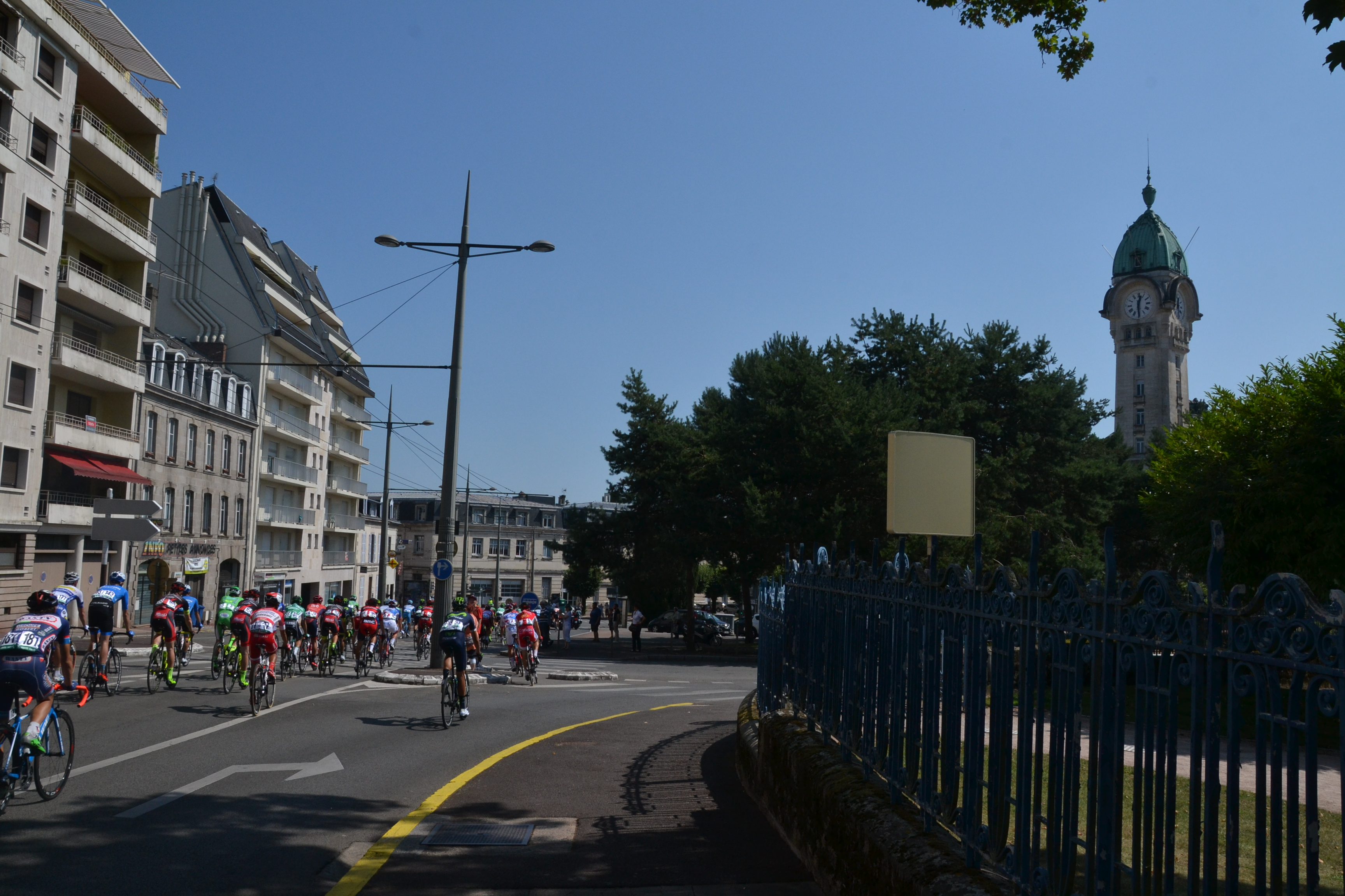 Départ de la 1e étape du Tour du Limousin 2016 à Limoges (Haute-Vienne, France).